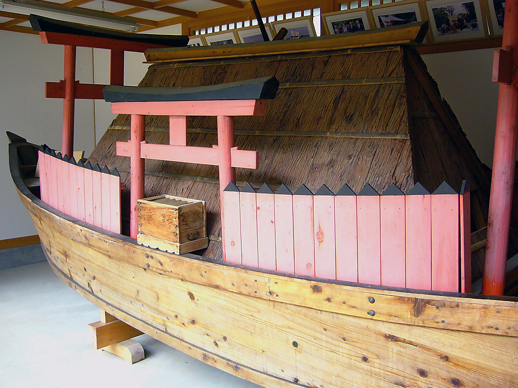 Fudarakusanji in Nachikatsuura, Wakayama prefecture